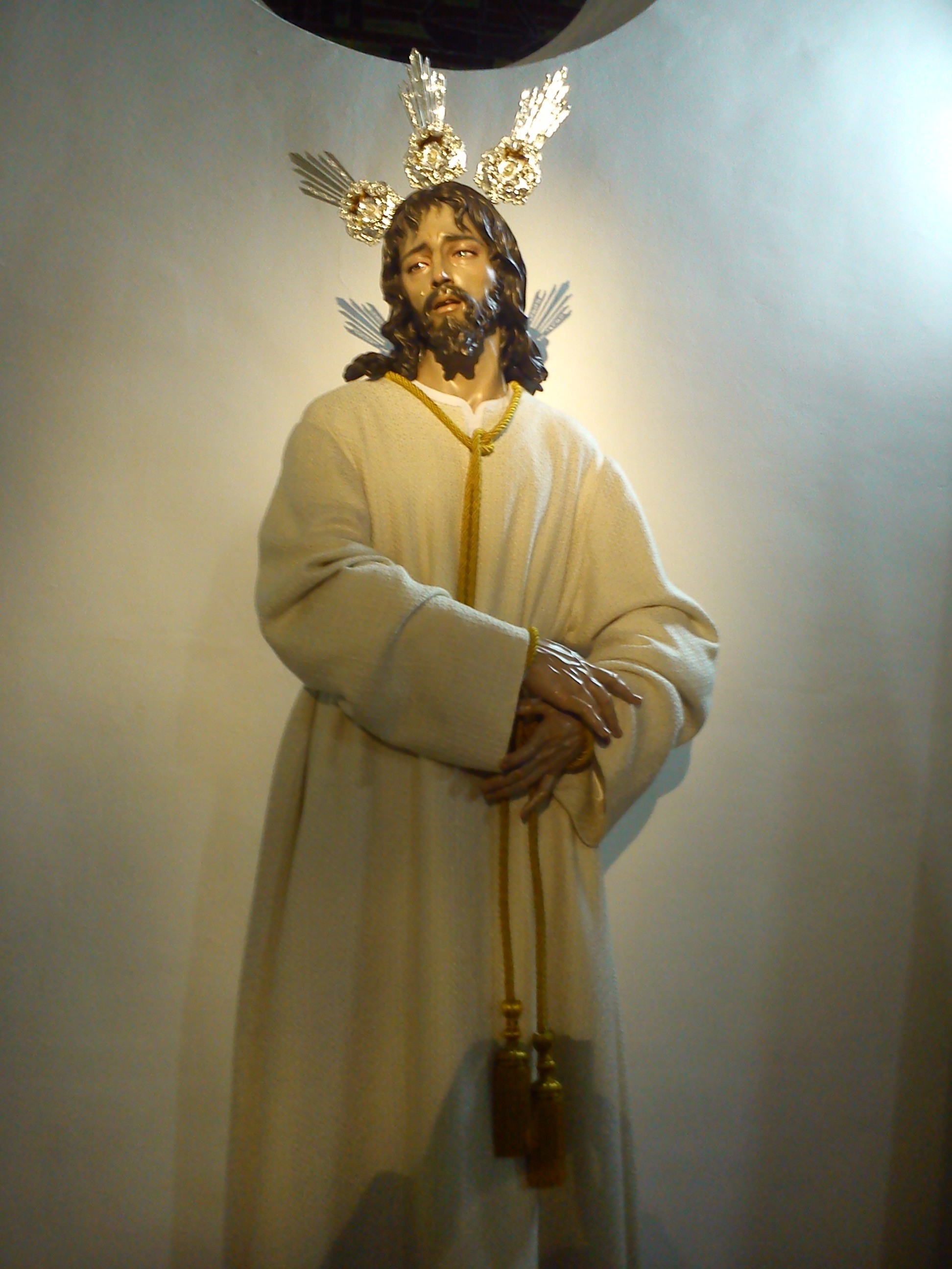 Imagen de Jesús Cautivo que se venera en la parroquia de Santa Isabel de Jaén. Es obra de Francisco Romero Zafra en 2012.